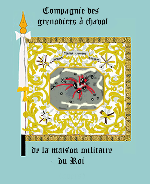 Standarte der Grenadiers à cheval de la garde (Frankreich)